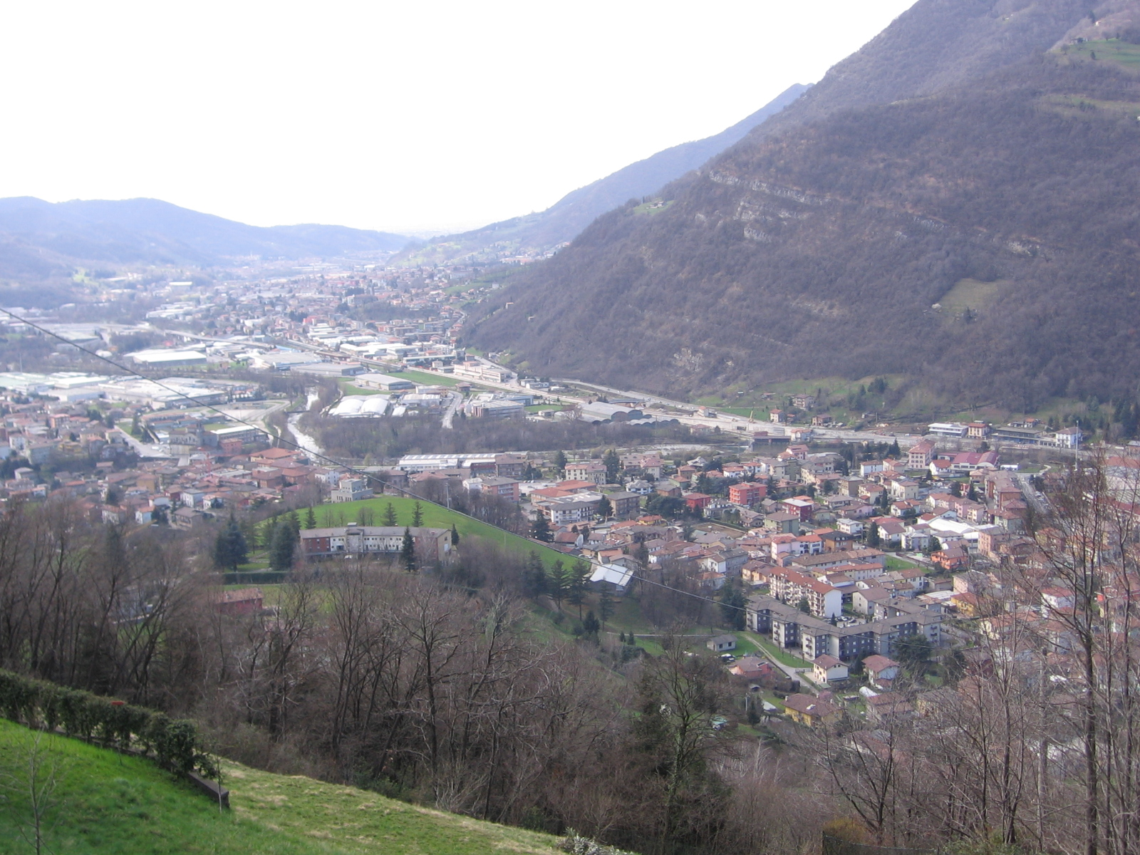 Cene, Bergamo, Italia